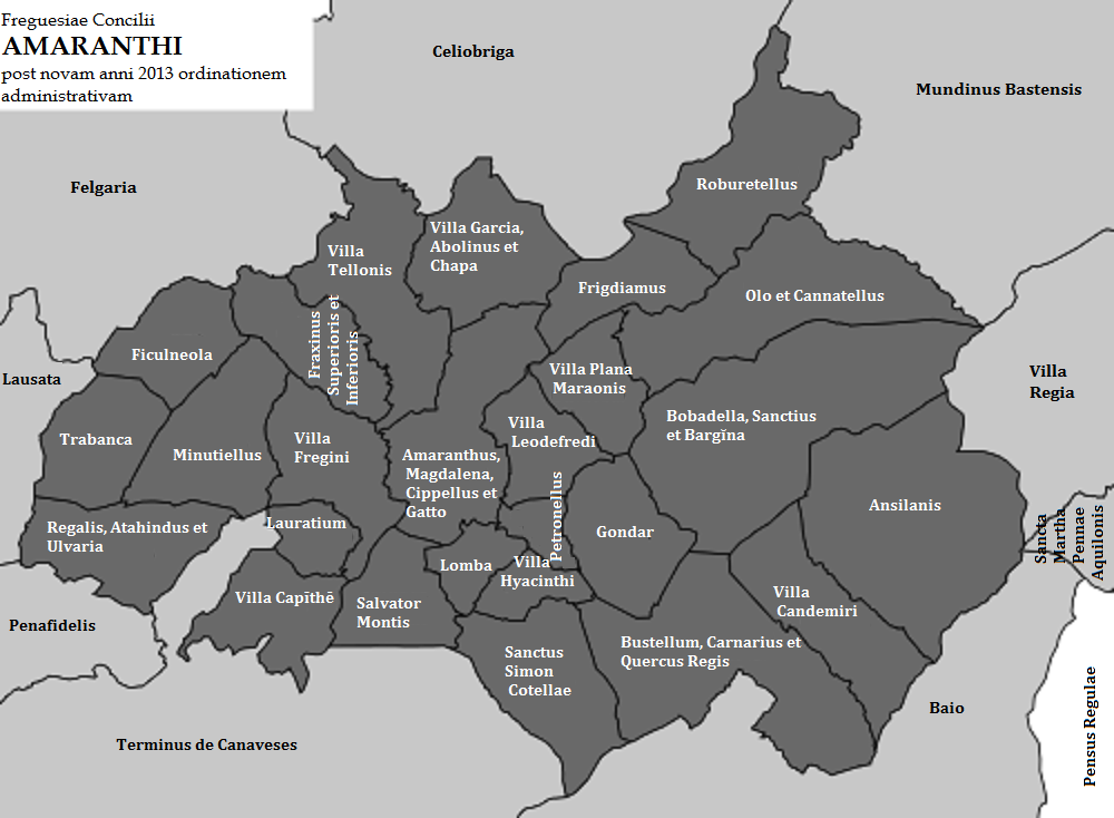 Amaranthi freguesiae anni 2013